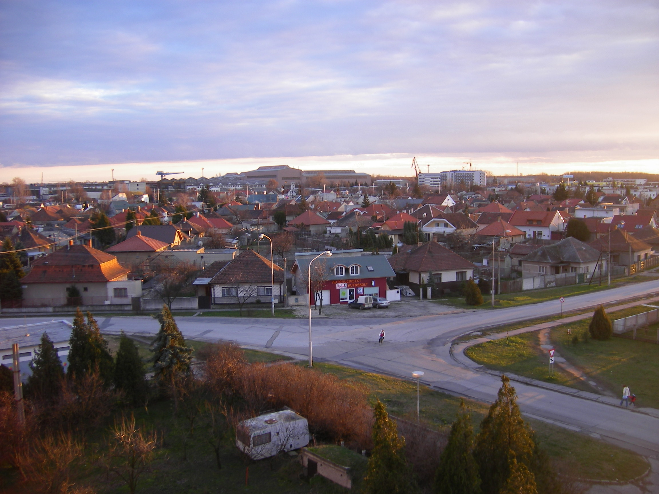 Komárom - A Bene-városrész háttérben a hajógyárral.